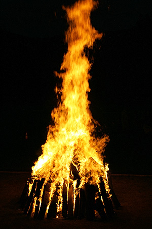 1. August-Feier in Reinach (BL): Höhenfeuer